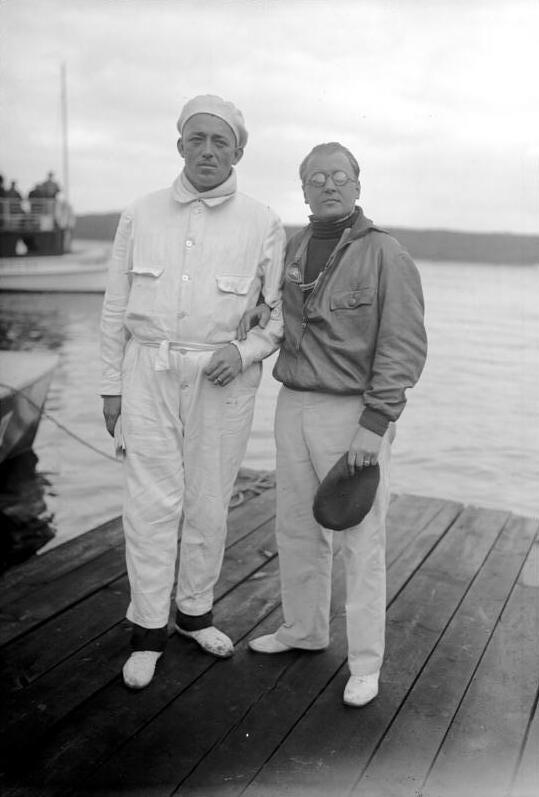 Die große internationalen Motorbootrennen auf dem Templiner-See b/Potsdam, fanden unter Anwesenheit von deutschen, englischen, amerikanischen und französischen Rennbooten statt. Ein deutscher Sieg im internationalen Motorbootrennen! Fritz von Opel (rechts im Bilde) welcher den Franzosen Sigrand (links) bei der ersten Begegnung erfolgreich schlug, Arm in Arm nach dem Sieg. Information added by Wikimedia users.Geänderte, korrekte Beschreibung: Das große internationale Motorbootrennen auf dem Templiner-See bei Potsdam fand vom 15. bis 17. Juni 1928 unter Anwesenheit von deutschen, englischen, amerikanischen und französischen Rennbooten statt. In der unbeschränkten Klasse musste sich Fritz von Opel (rechts im Bild) mit seinem Boot Opel II dem Franzosen M. Sigrand (links) im Boot Pah Sih Fou geschlagen geben. (Quelle: Zeitschrift Die Yacht, Heft 27/1928, S. 25)